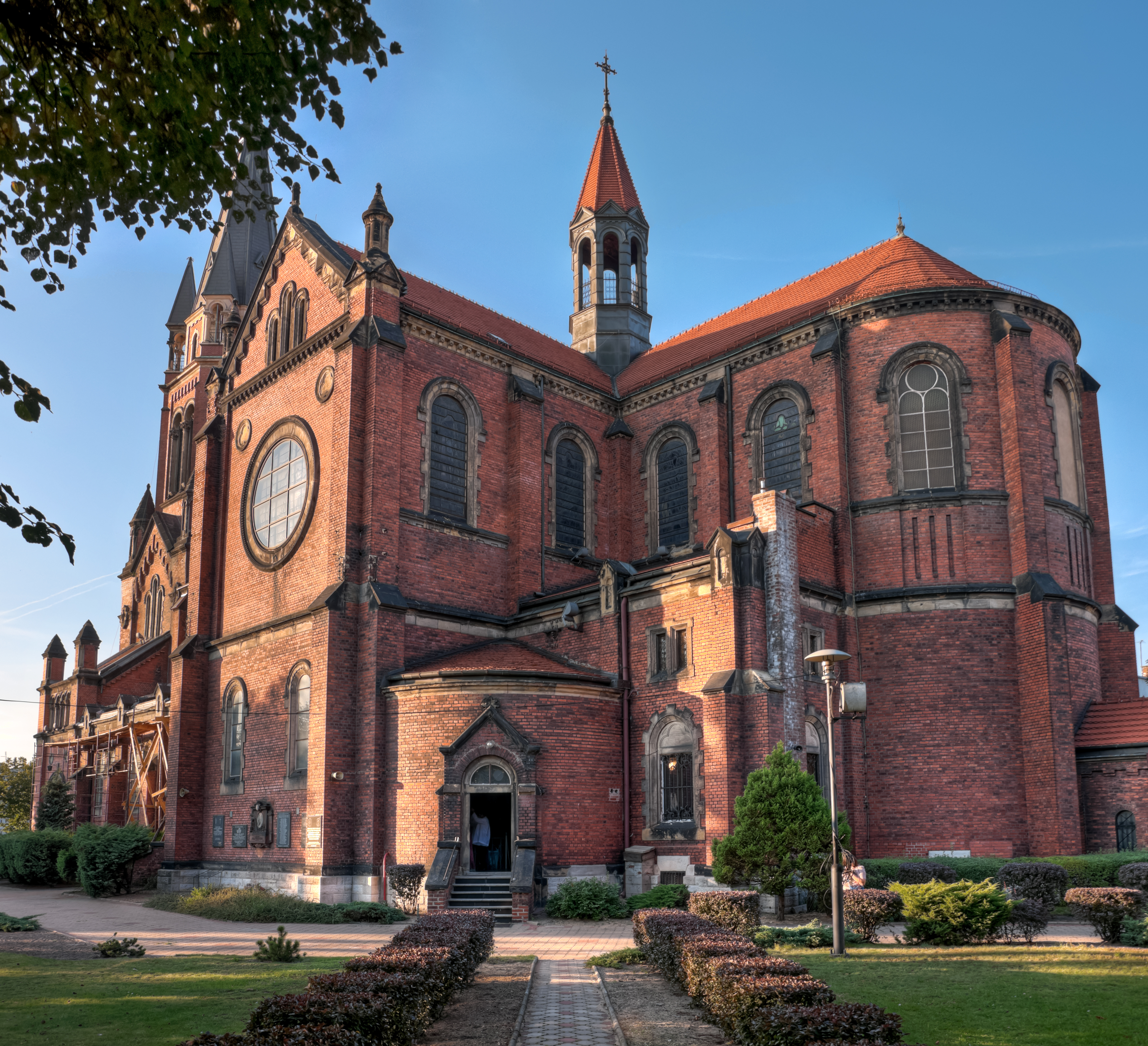 Katedra p.w. Wniebowzięcia NMP w Sosnowcu